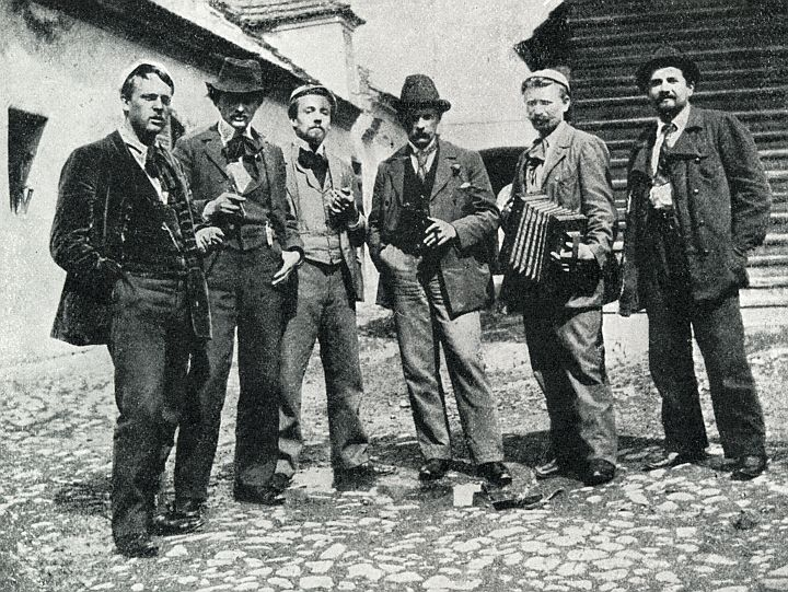 Mařákovi žáci, zleva - Kalvoda, Langer, Sátra, Ullmann, Bubeníček, Lolek, Lochovice (1898-99)